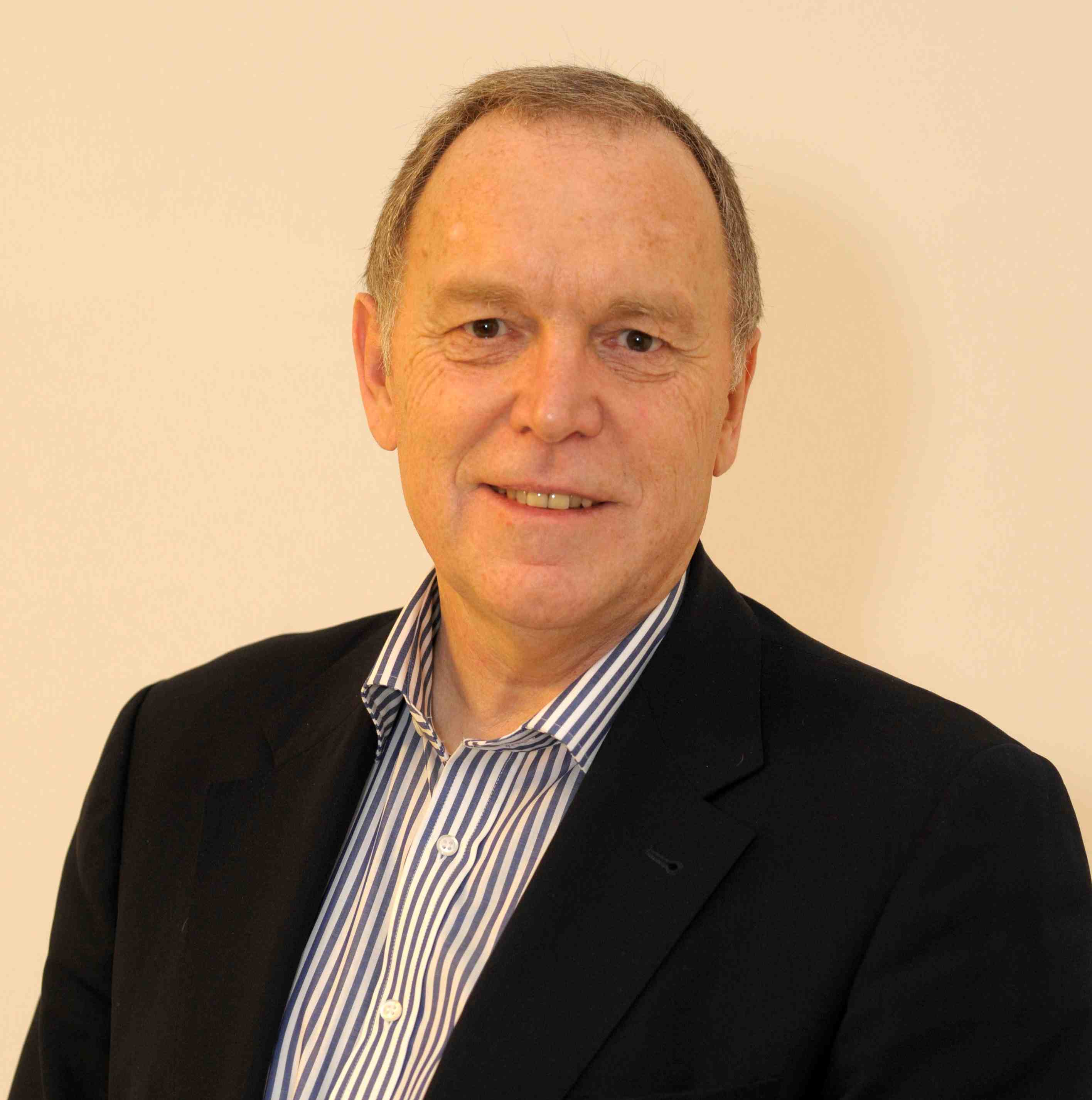 Foto Ellis Huber